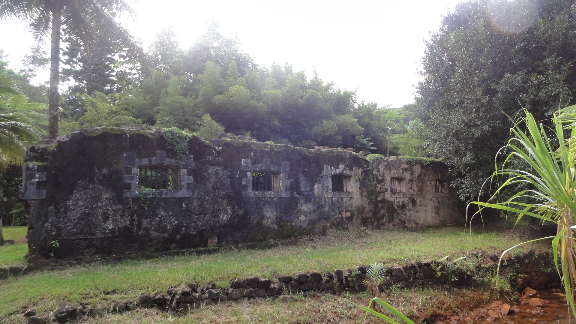 Vestiges du bagne dans l'ancien village de Prony